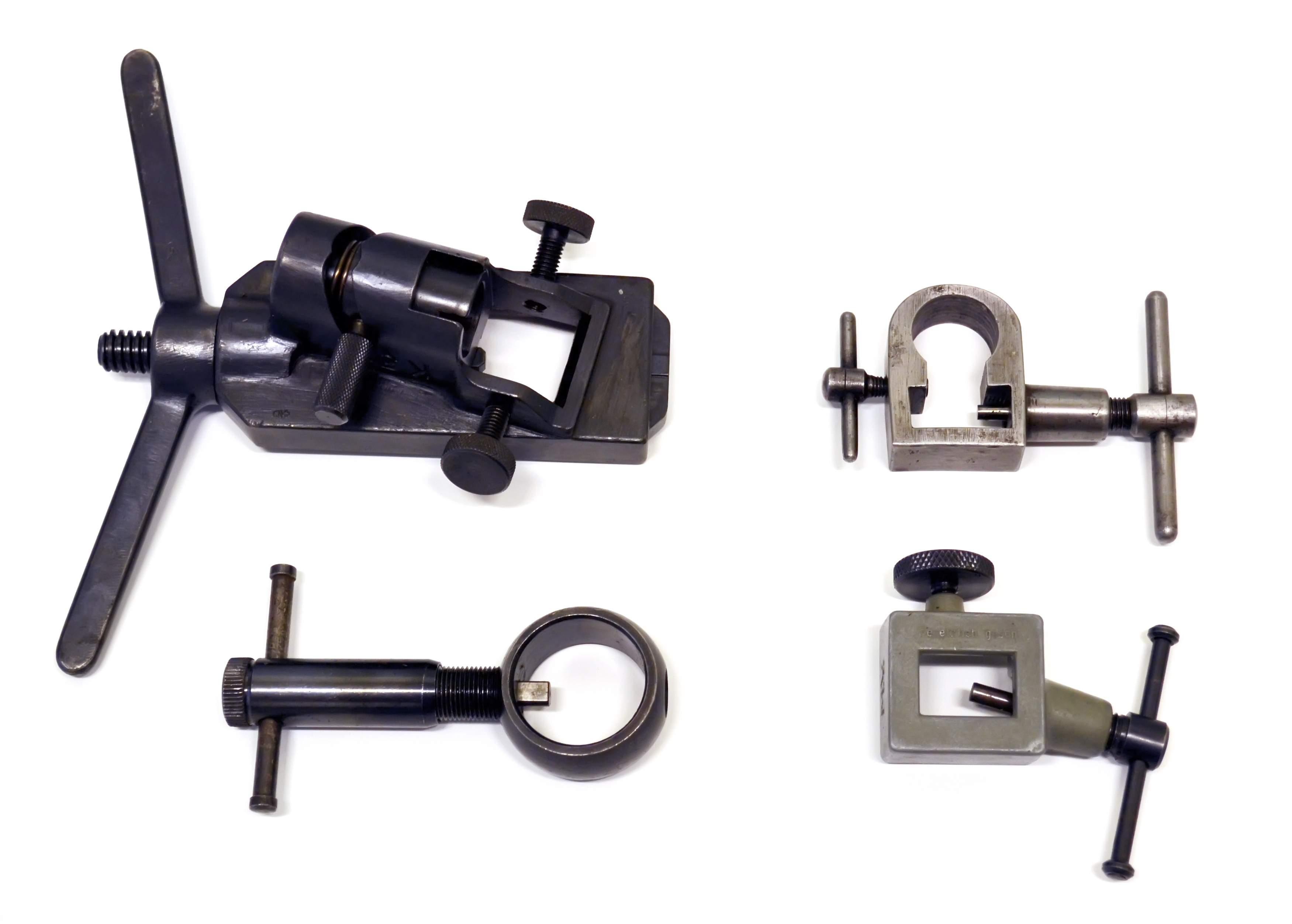 Pousse-guidon pour mousqueton 1911 et 1931. Pousse-guidon pour M1889 en haut à droite